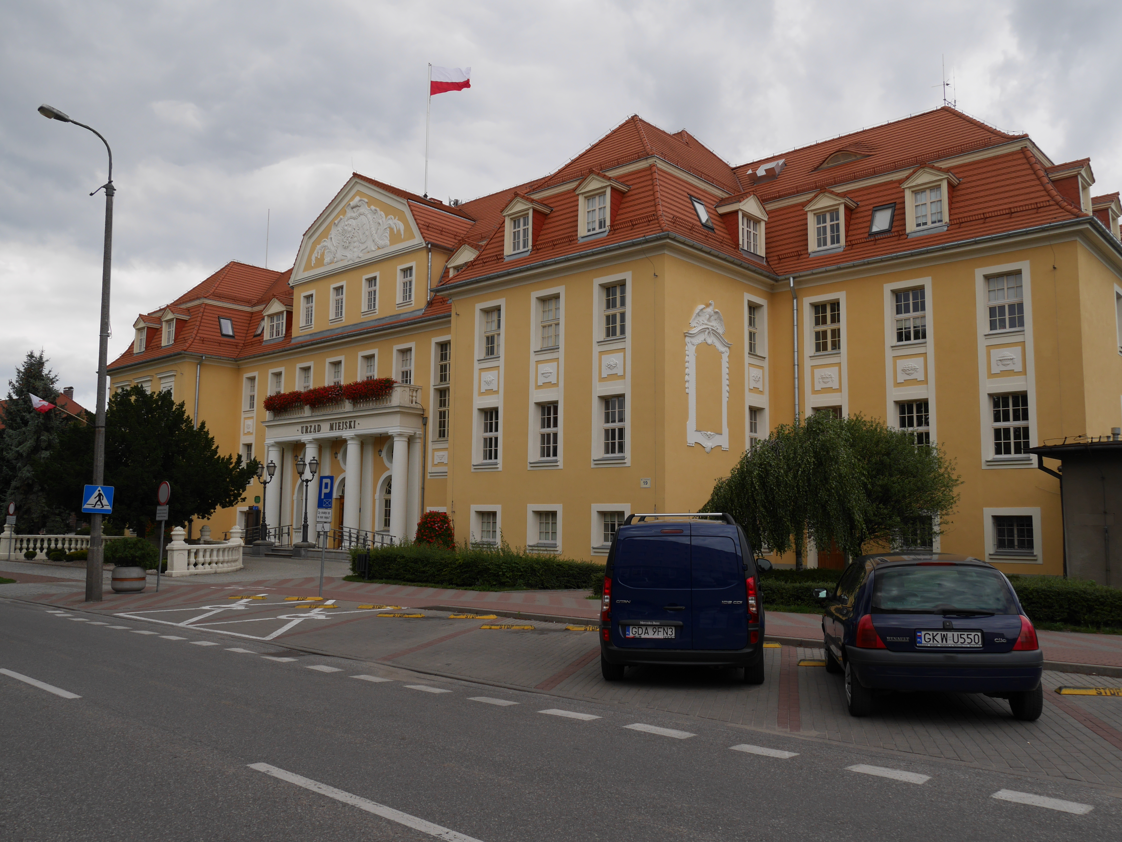 Kwidzyn, budynek Urzędu Miasta, 1918-1925